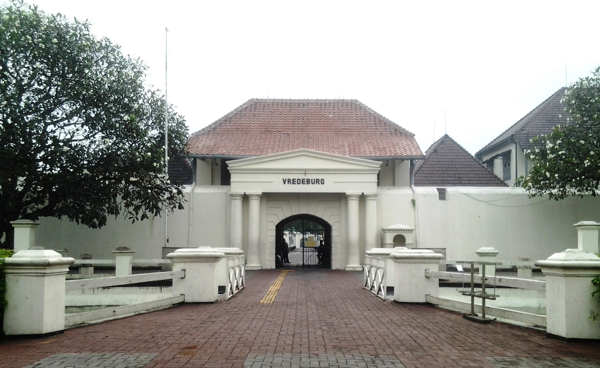 Gerbang depan Museum Vredeburg Yogyakarta, Indonesia.